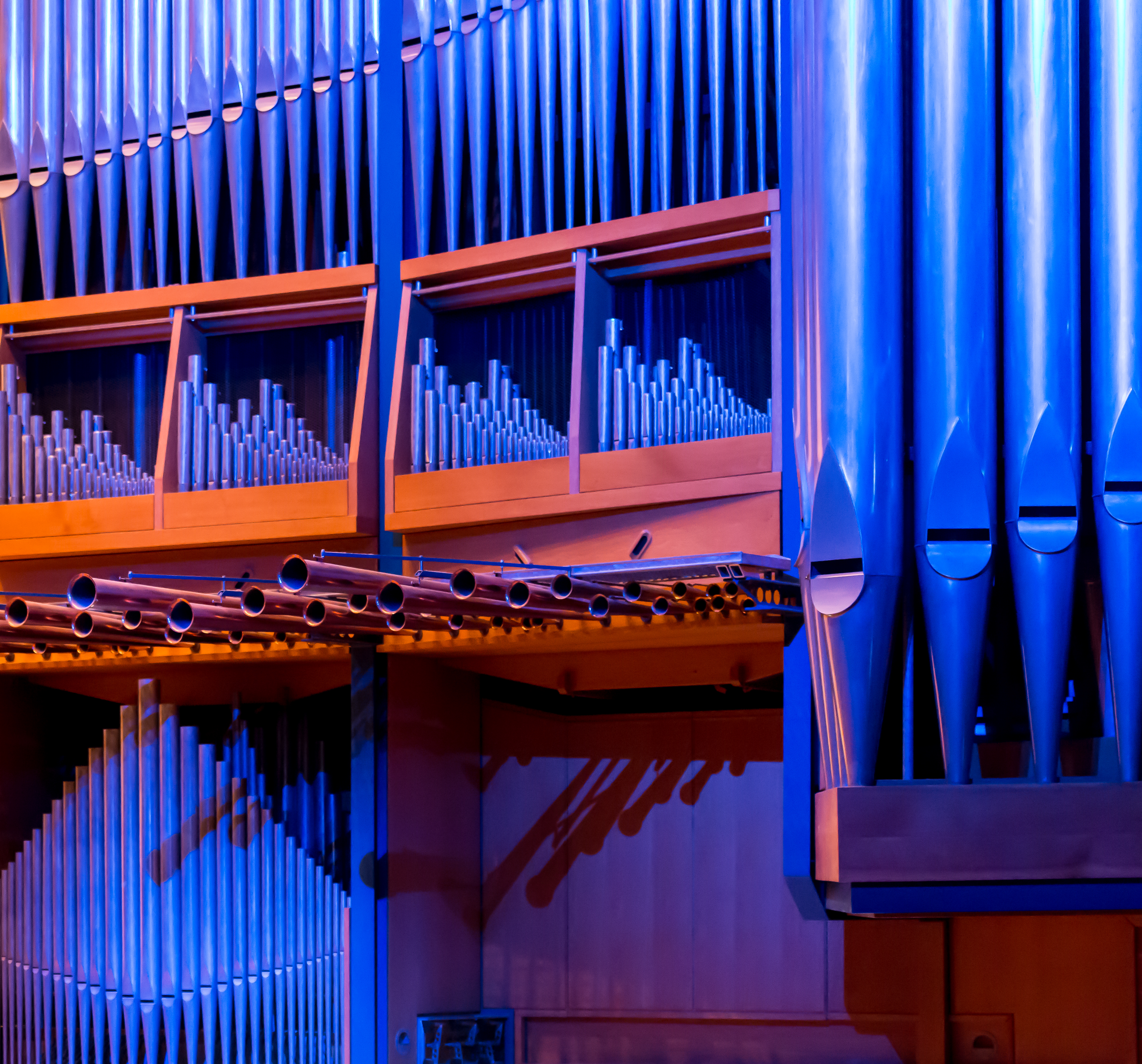 D'Uergel am Stater Conservatoire.